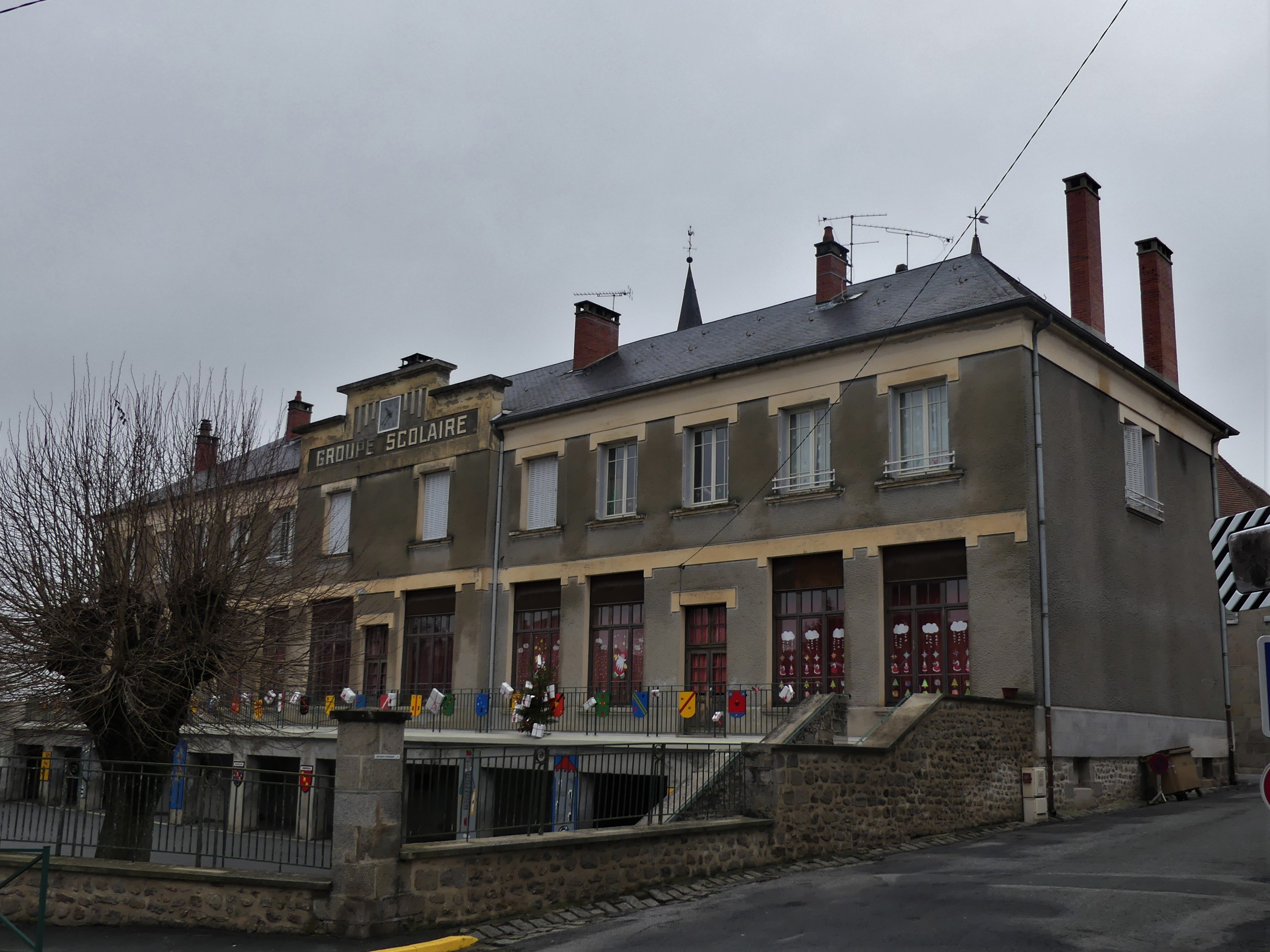 Le groupe scolaire de Chénérailles, Creuse, France.